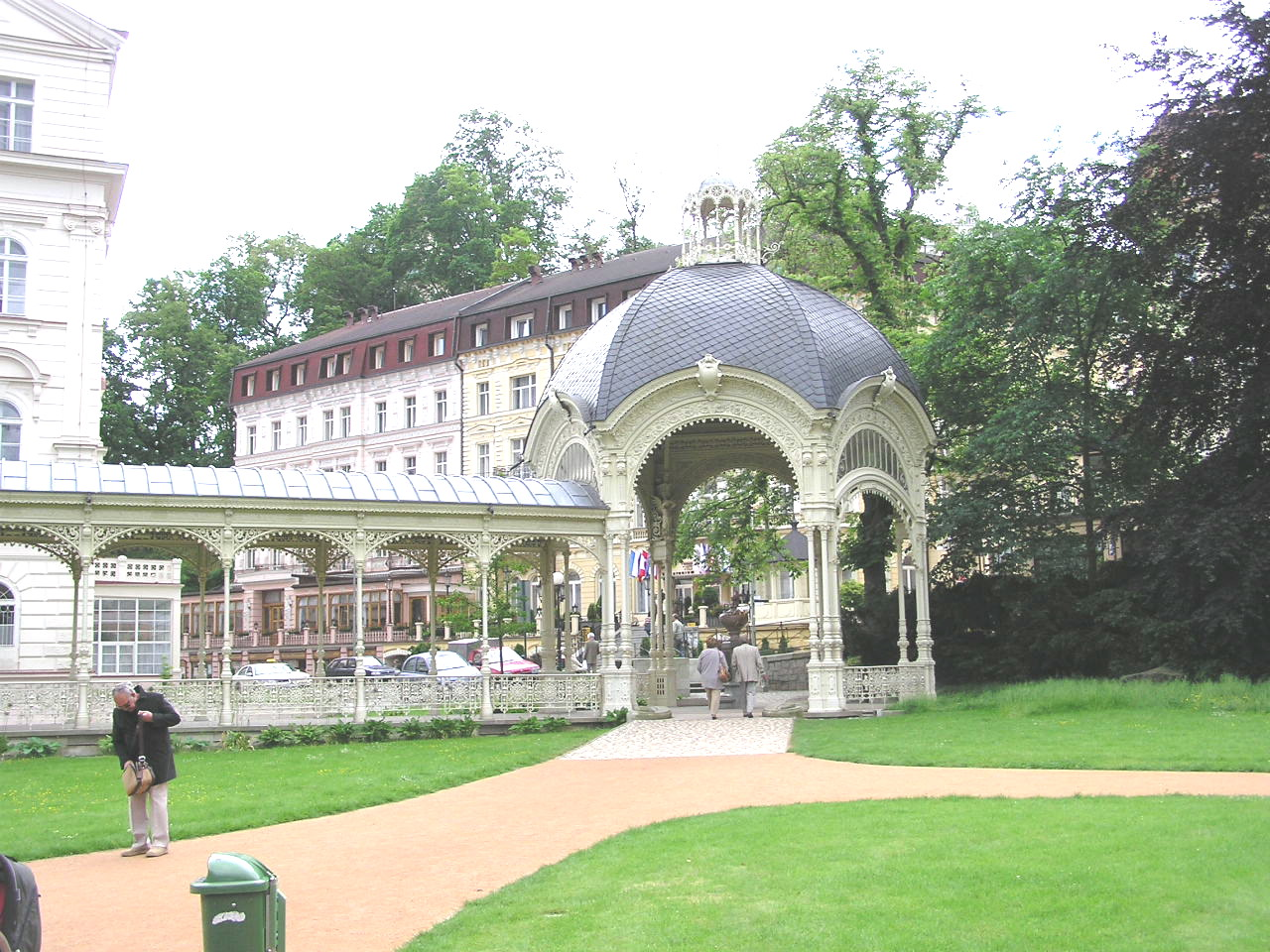 Karlovy Vary (Karlsbad) Parkkolonnade